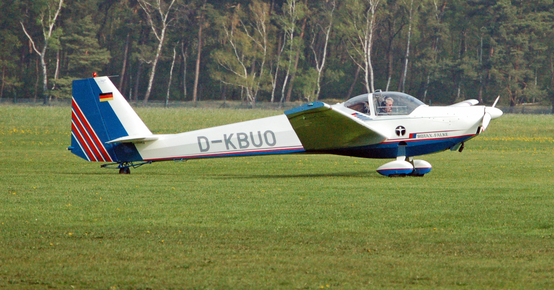 Scheibe SF 25 (D-KBUO) auf dem Flugplatz Uetersen